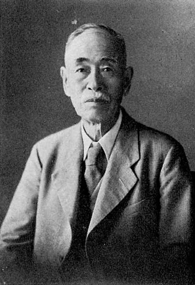 昭和22年11月 喜寿を迎えた針塚長太郎